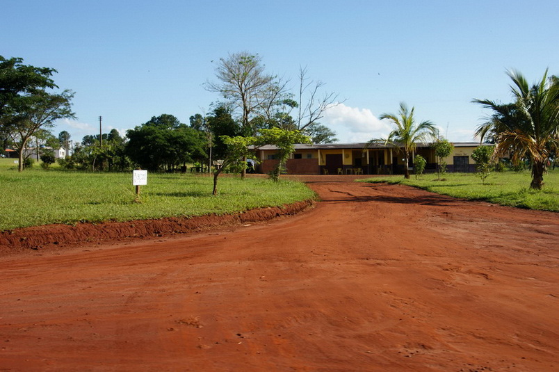 Imagem do município de Avaré, estado de São Paulo, Brasil.